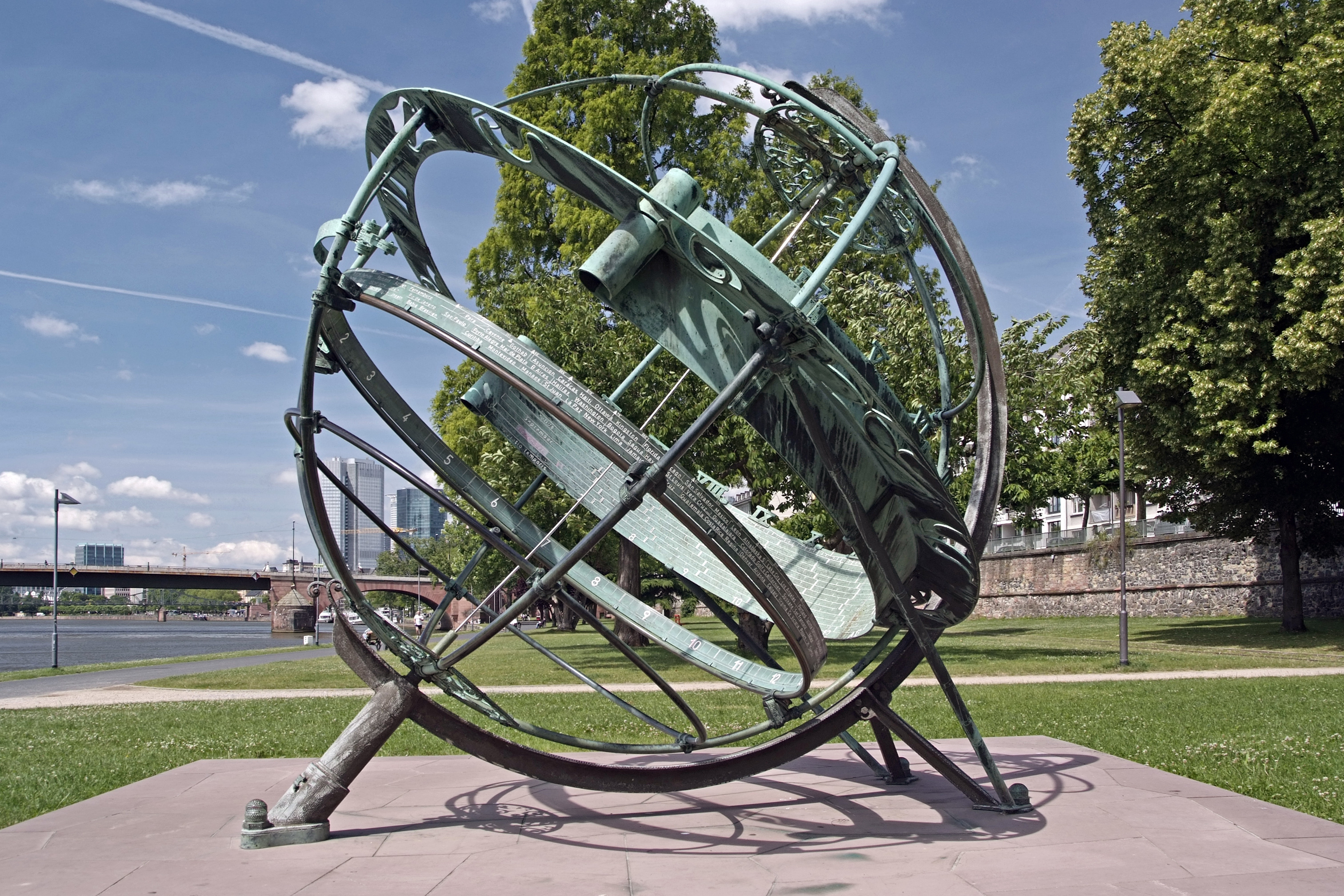 Äquatorialsonnenuhr in Frankfurt am MainAnsicht von Ost